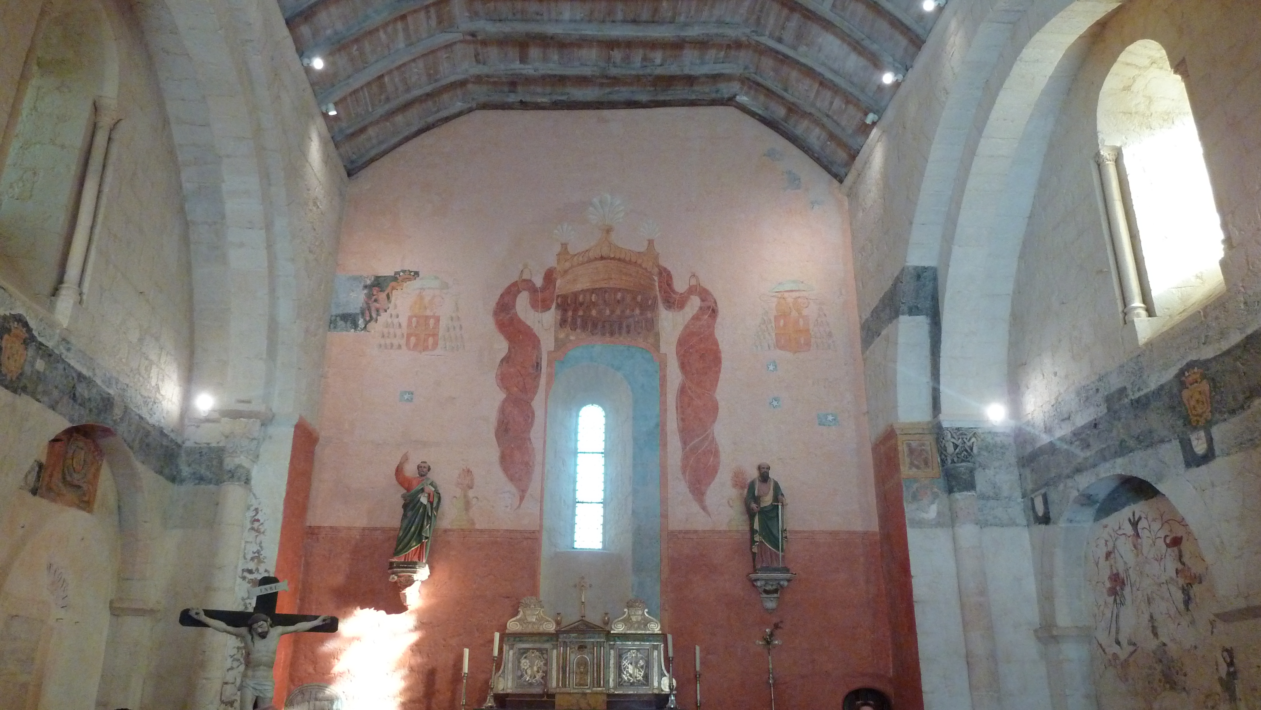 peinture murale int eglise feuillade